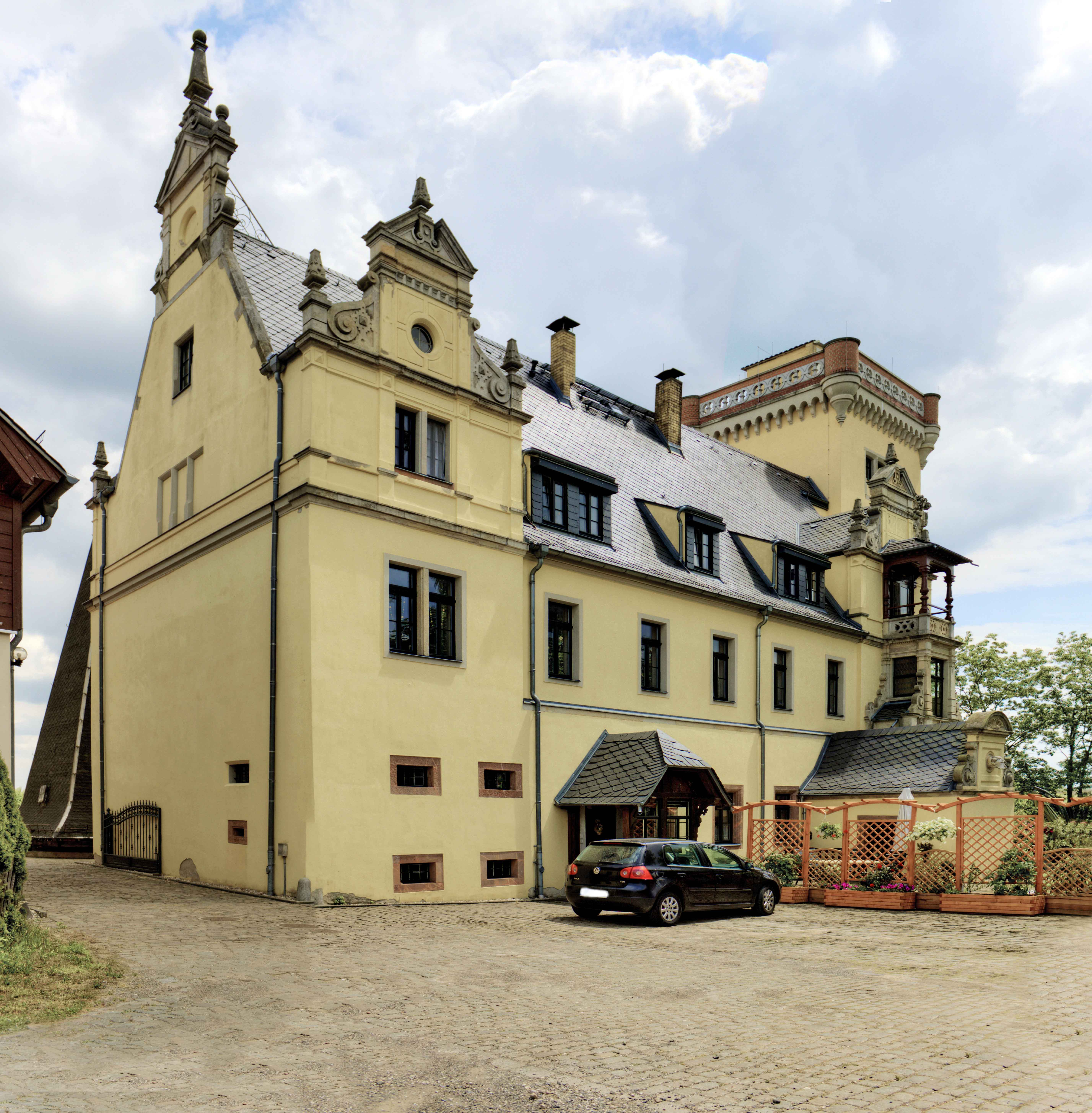 Schloss Kötteritzsch, Kötteritzscher Ring 22 ff. in Colditz OT Sermuth